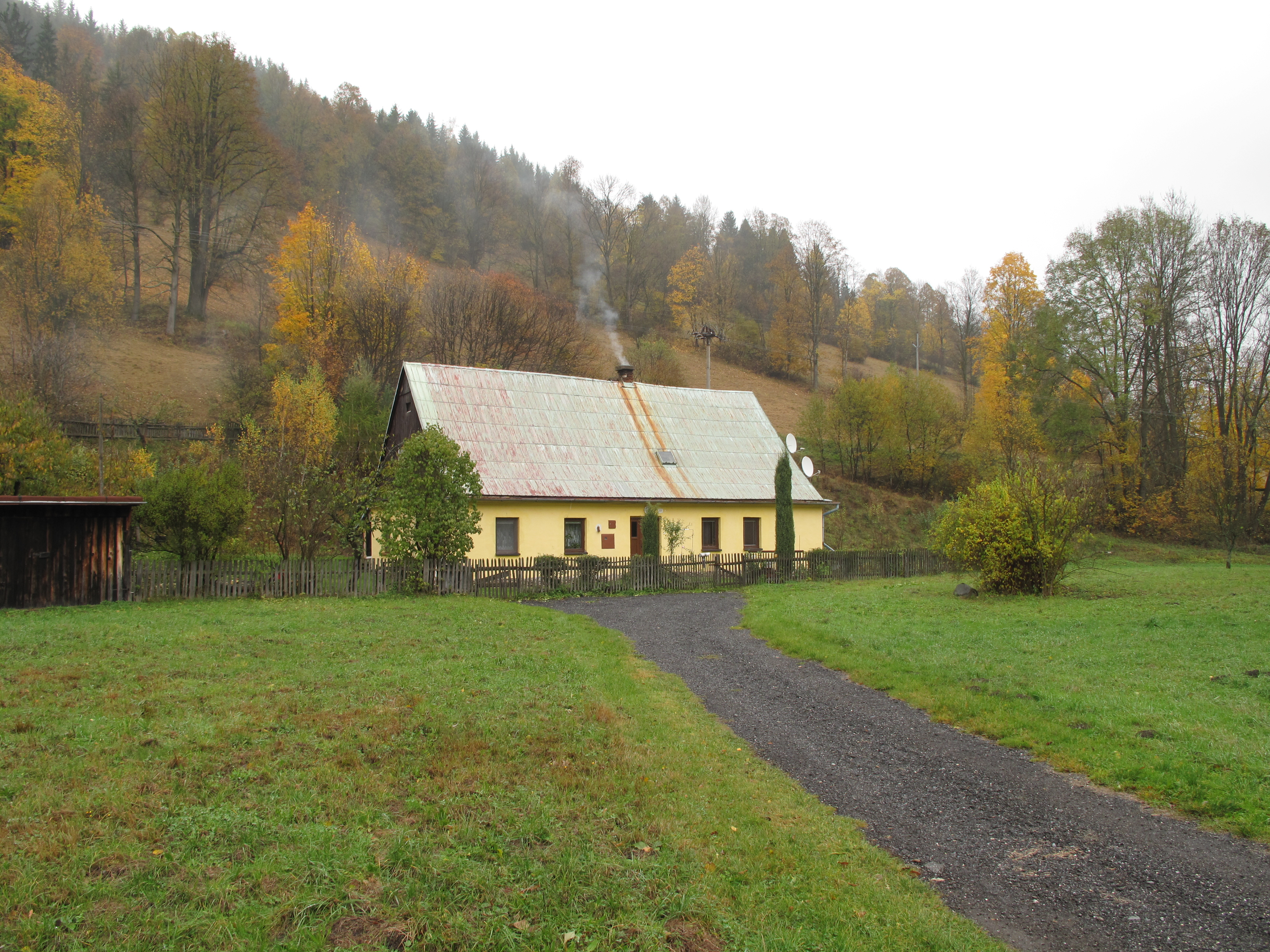 Spálené. Okres Bruntál, Česká republika.